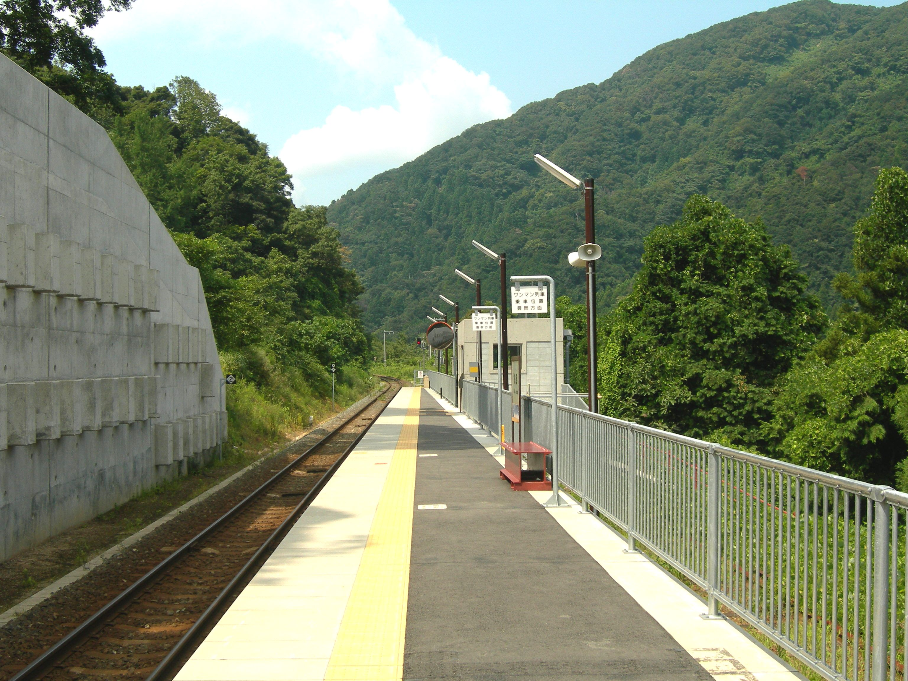 餘部駅のプラットホーム。